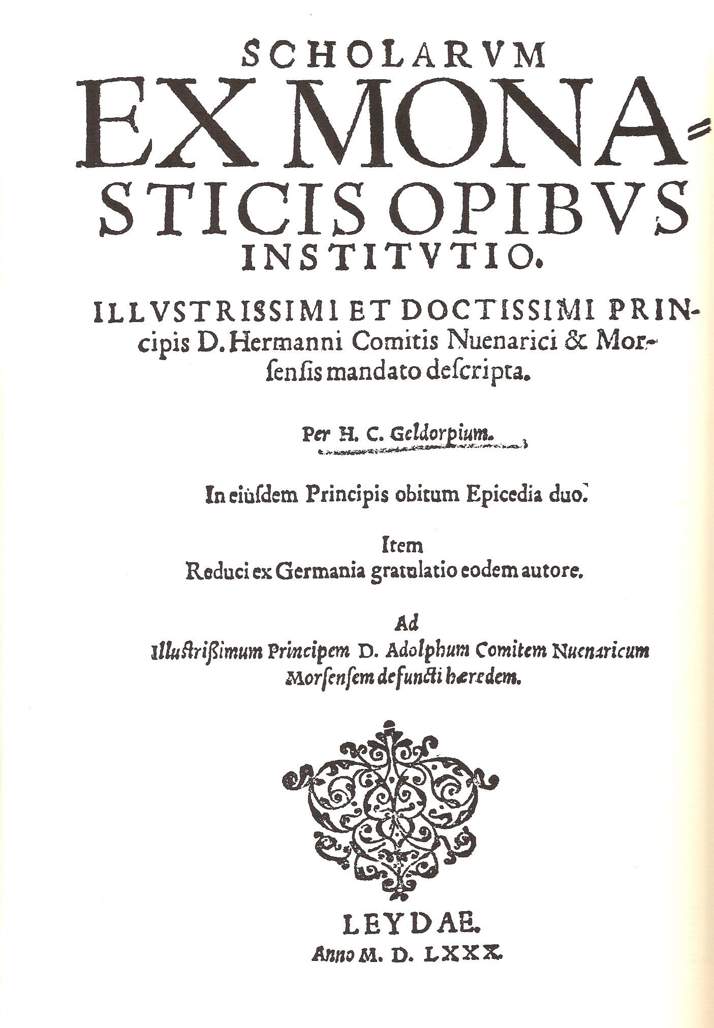 Deckblatt des Gutachtens zur Gründung des Gymnasium Adolfinum Moers Gymnasium Adolfinum 1582-1982 gescannt von Lutz Hartmann